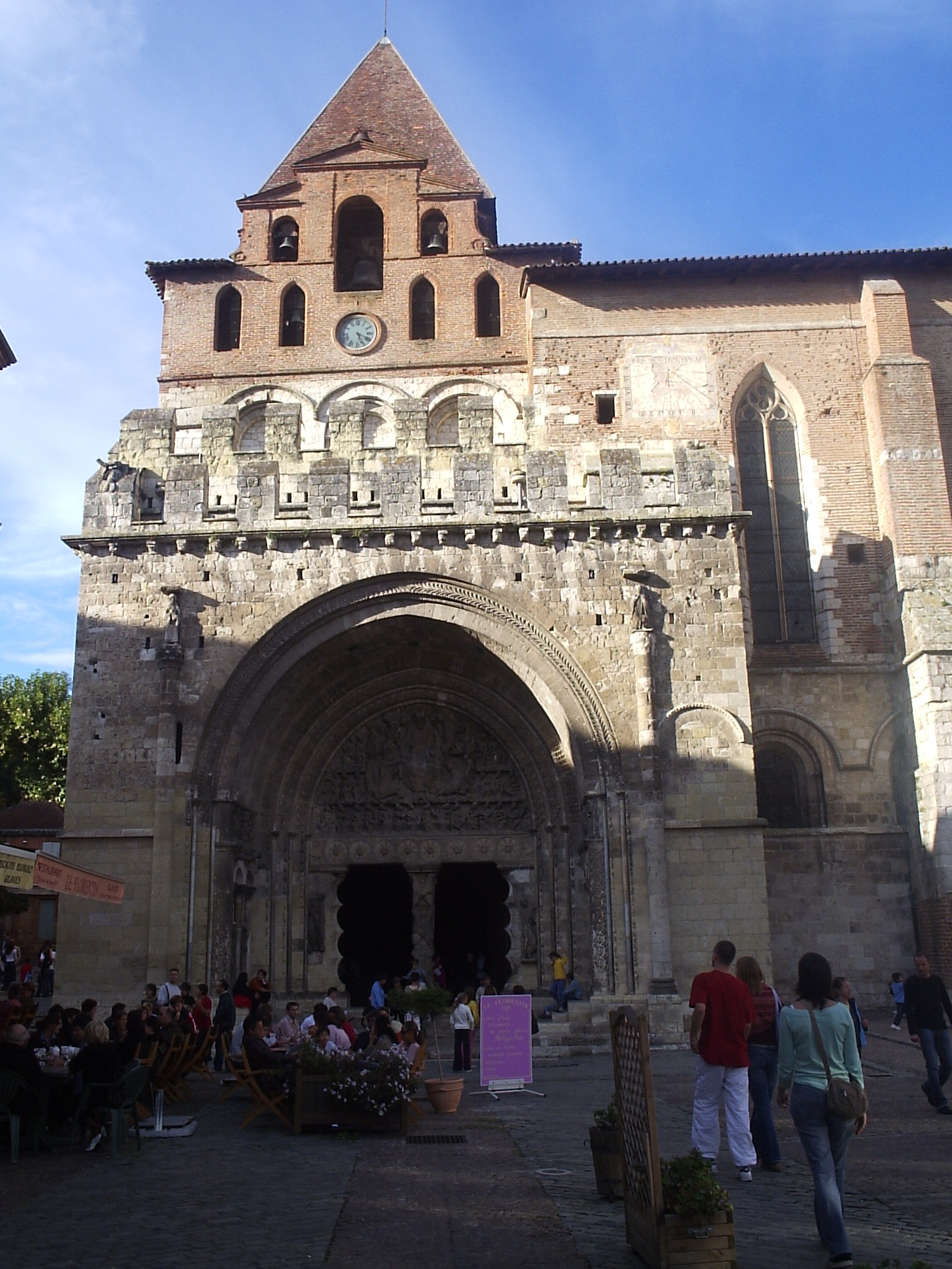 Abbaye Saint-Pierre (entrée), Moissac